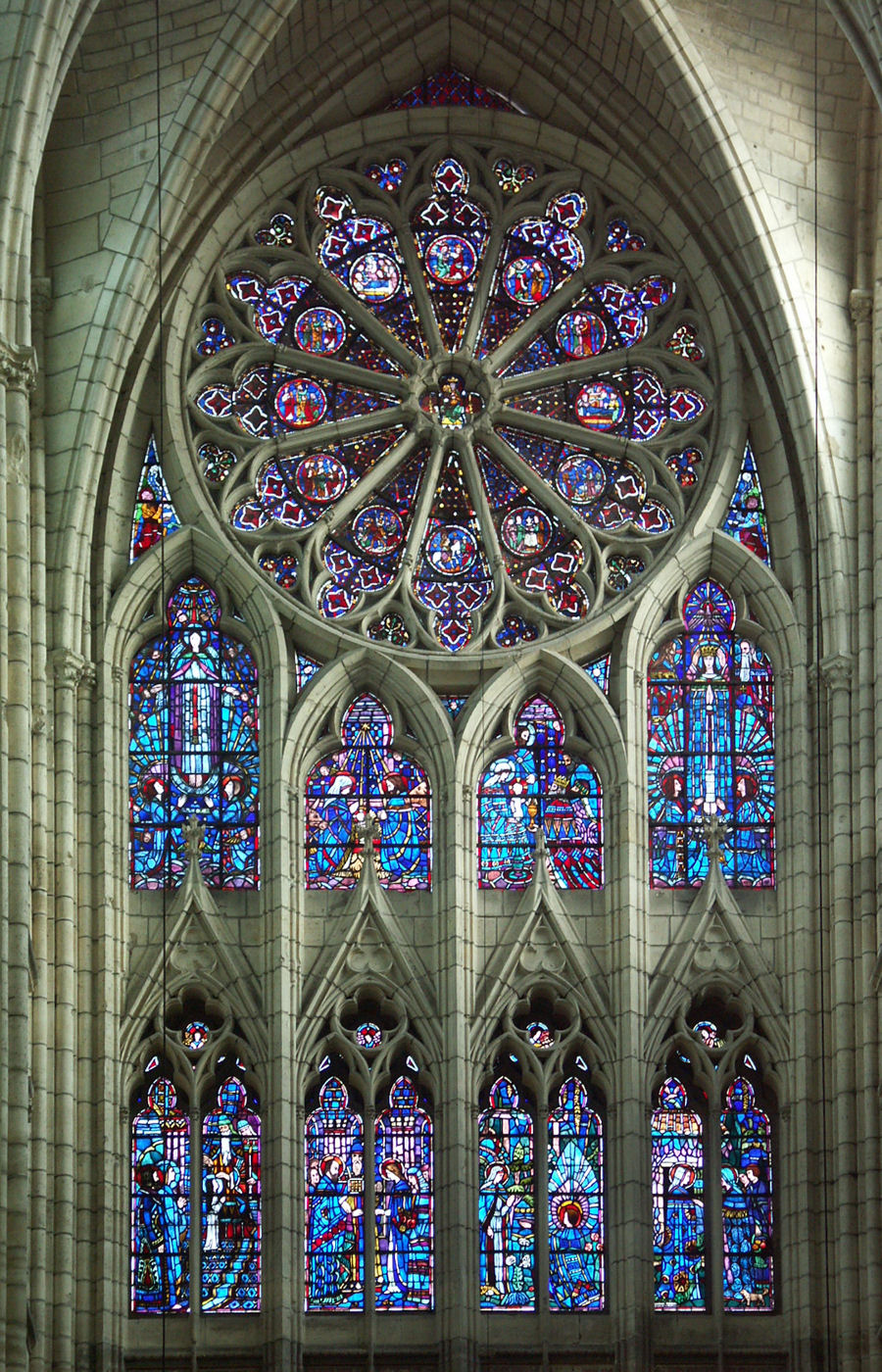 Cathédrale Saint-Gervais-et-Saint-Protais de Soissons, France - Rose window